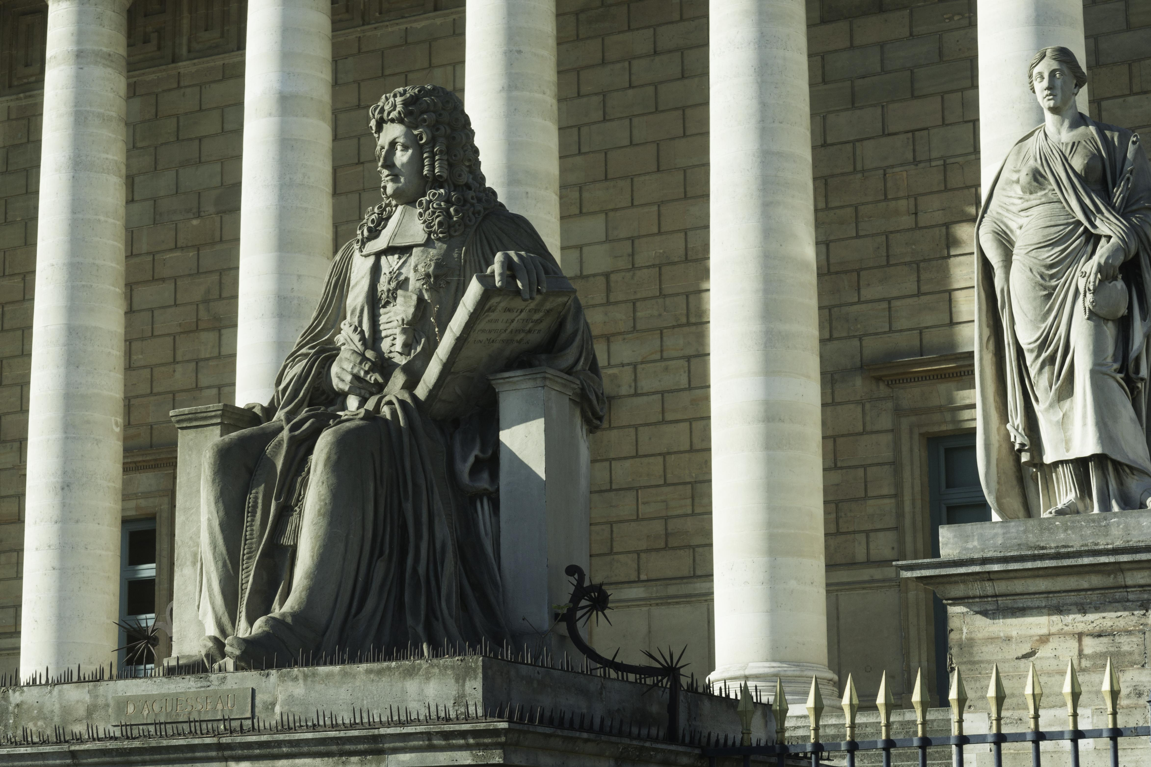 Statue of d'Aguesseau, Palais Bourbon, Paris.